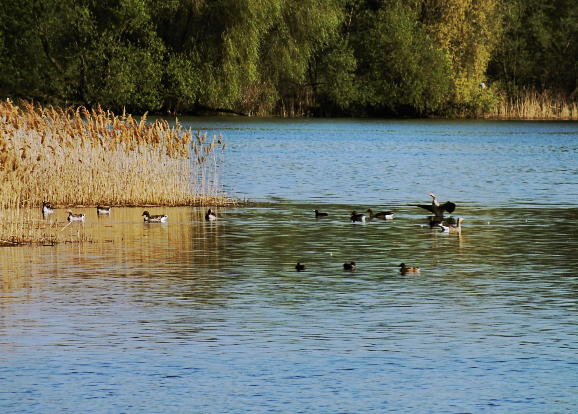 Ptaki na Stawie Słupickim Starym; widok z czatowni "Pod Rdzawoszyim"